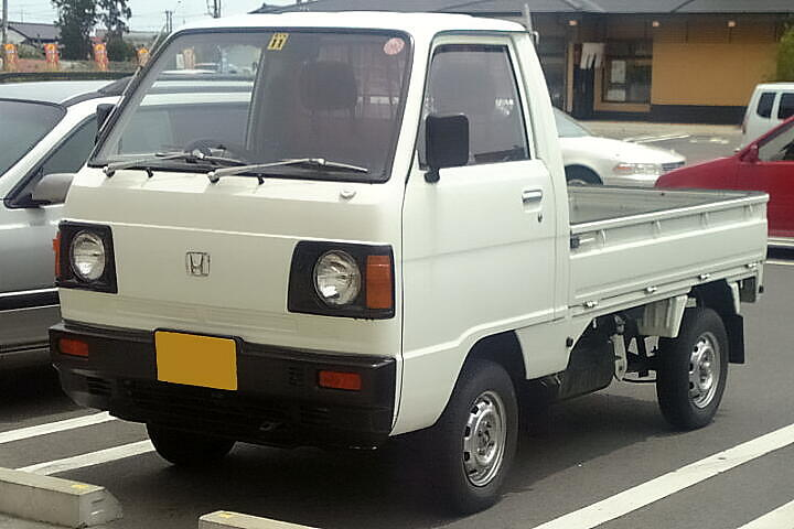 ホンダ・アクティトラック（初代・後期型）